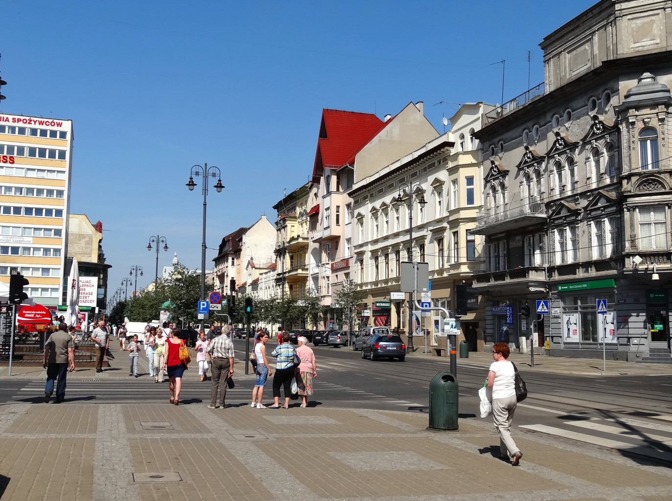 Ulica Gdańska w Bydgoszczy na odcinku między ul. Dworcową, a ul. Śniadeckich